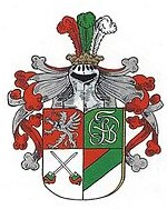 Wappen der Baltischen Corporation Livonia Dorpat